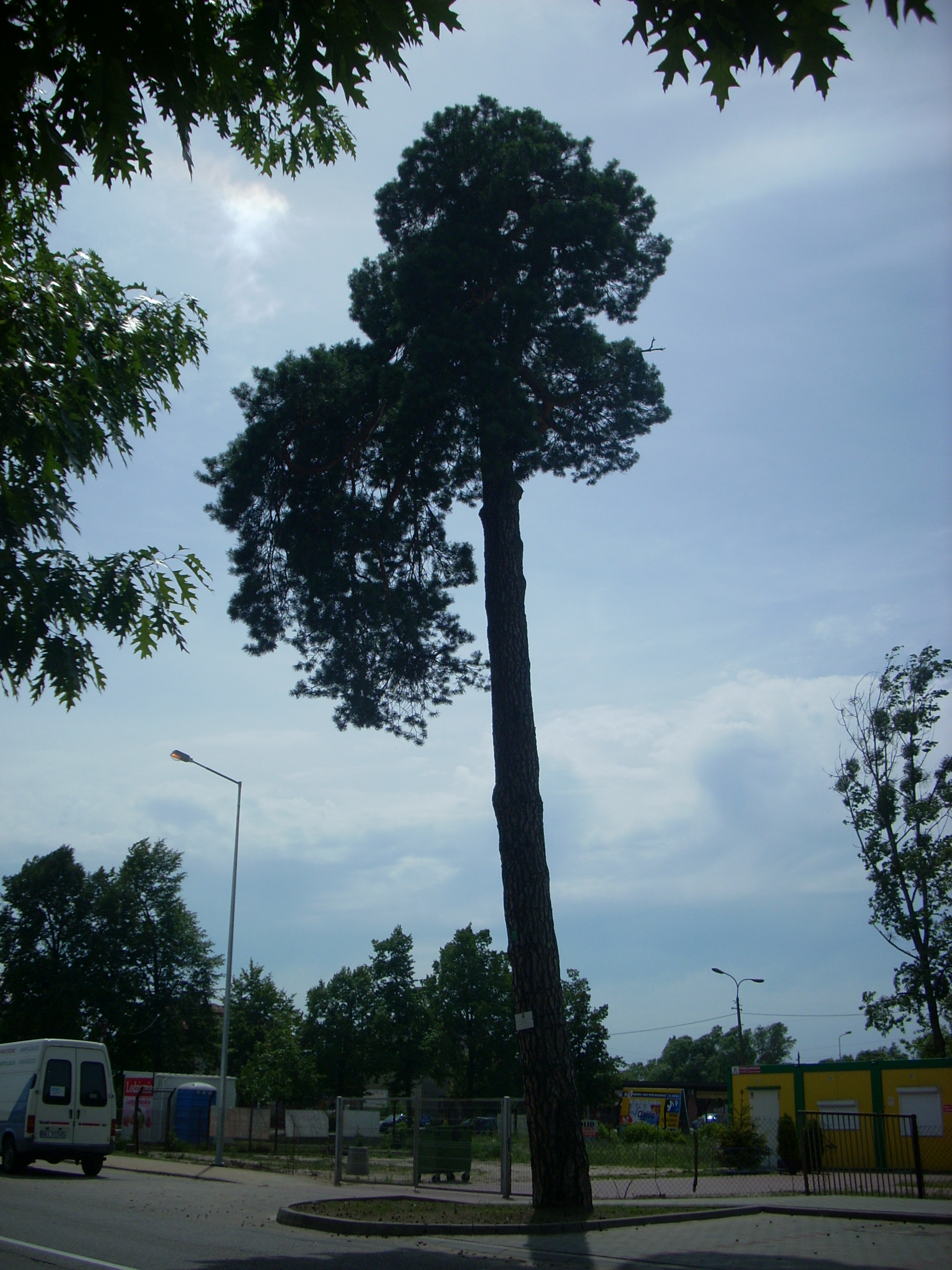 Sosna Anna - 200-letni pomnik przyrody